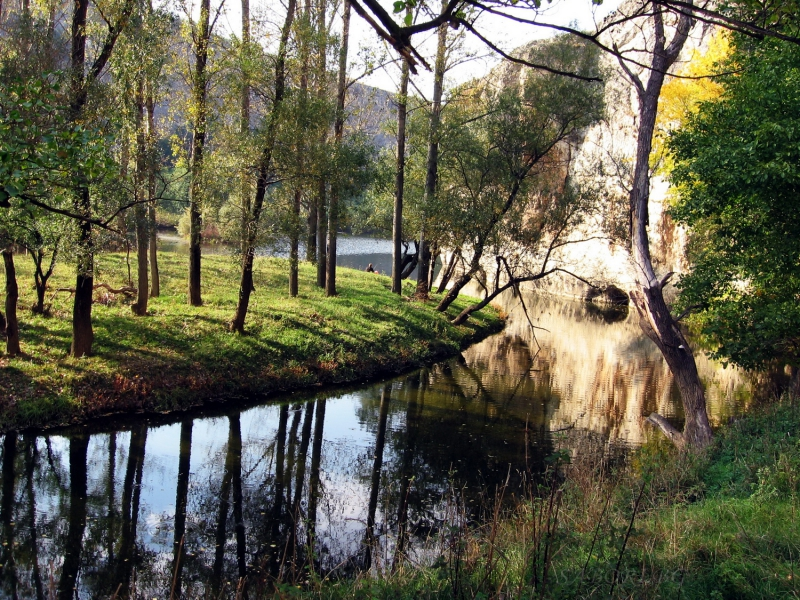 Садовец1